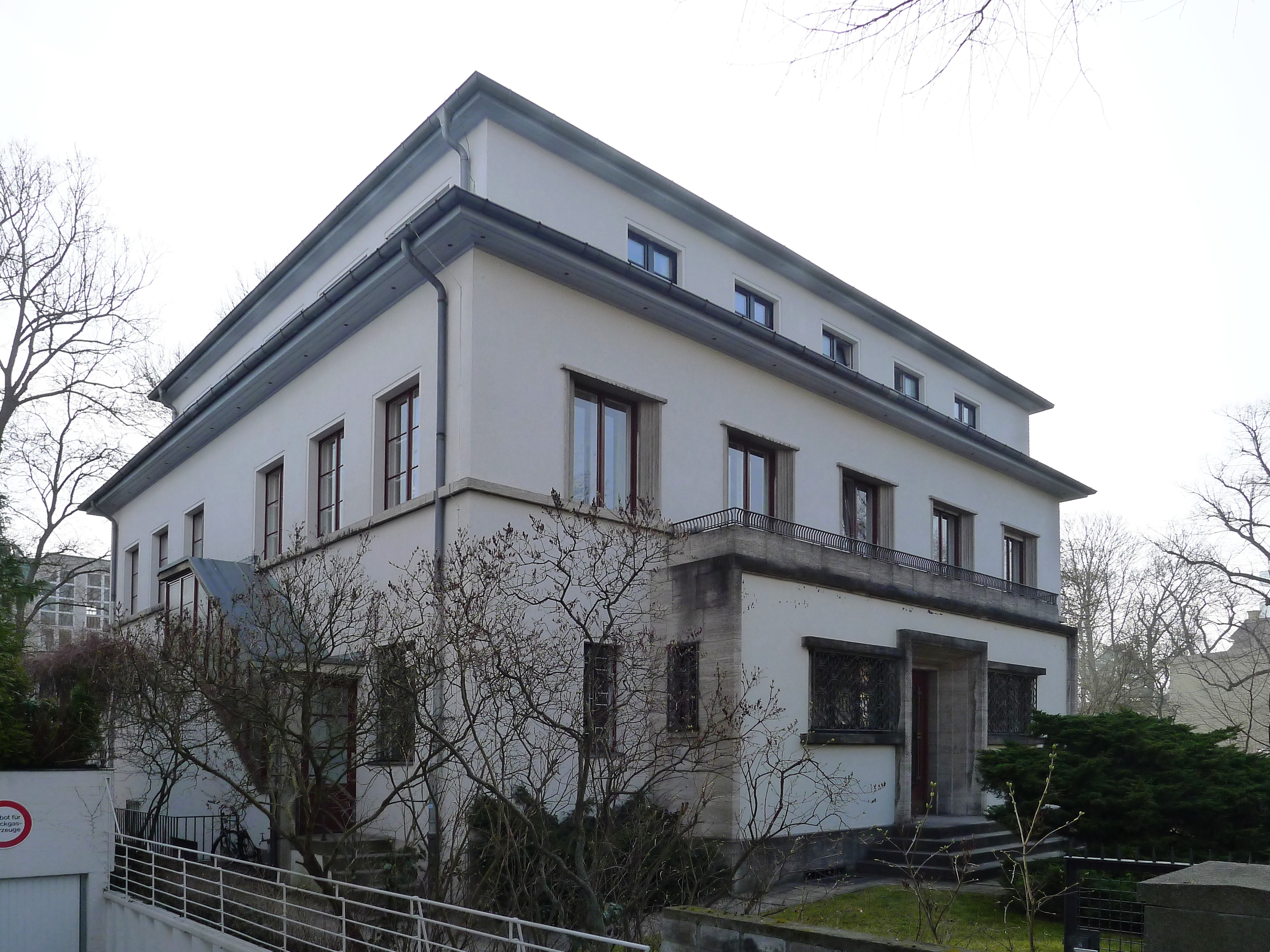 Wohnhaus